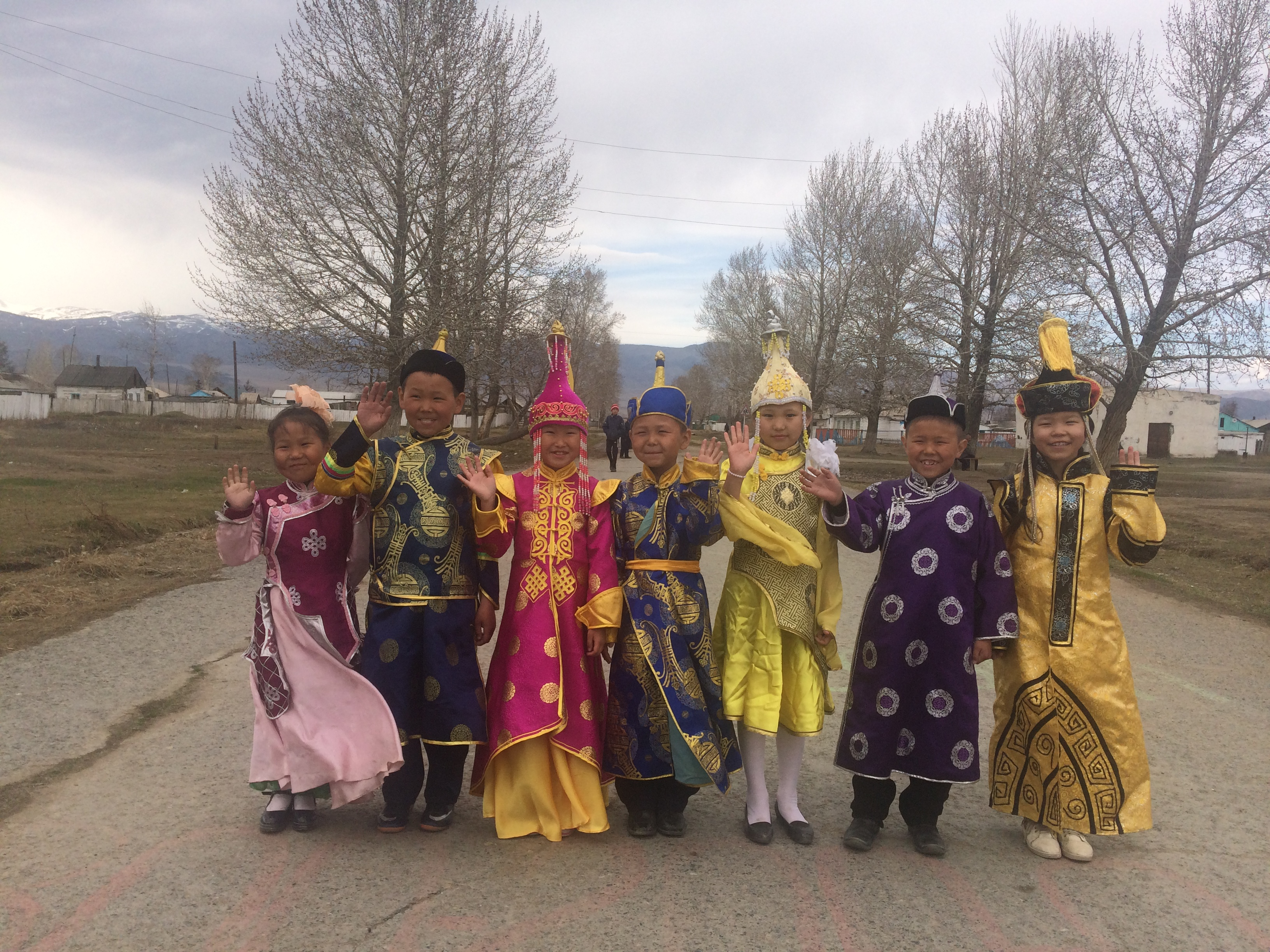 Дети села Кызыл-Даг Бай-Тайгинского кожууна Республики Тыва в национальных одеждах